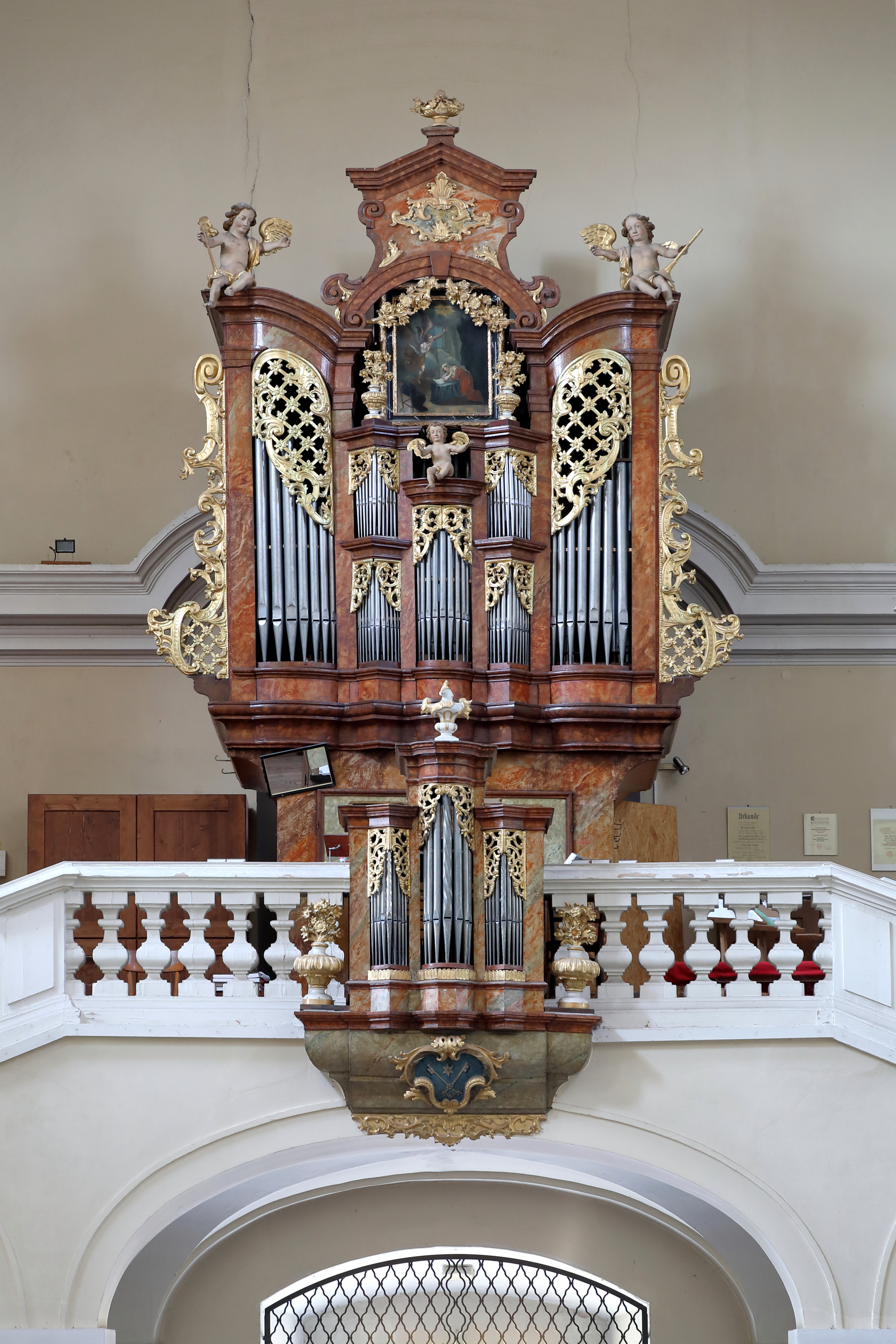 Die Orgel der röm.-kath. Pfarrkirche hl. Georg in der niederösterreichischen Marktgemeind Wullersdorf.Die Barockorgel wurde 1744 von Johann Hencke gefertigt und mehrfach verändert. Das Rückpositiv bzw. Brüstungspositiv dürfe älteren Ursprung sein.